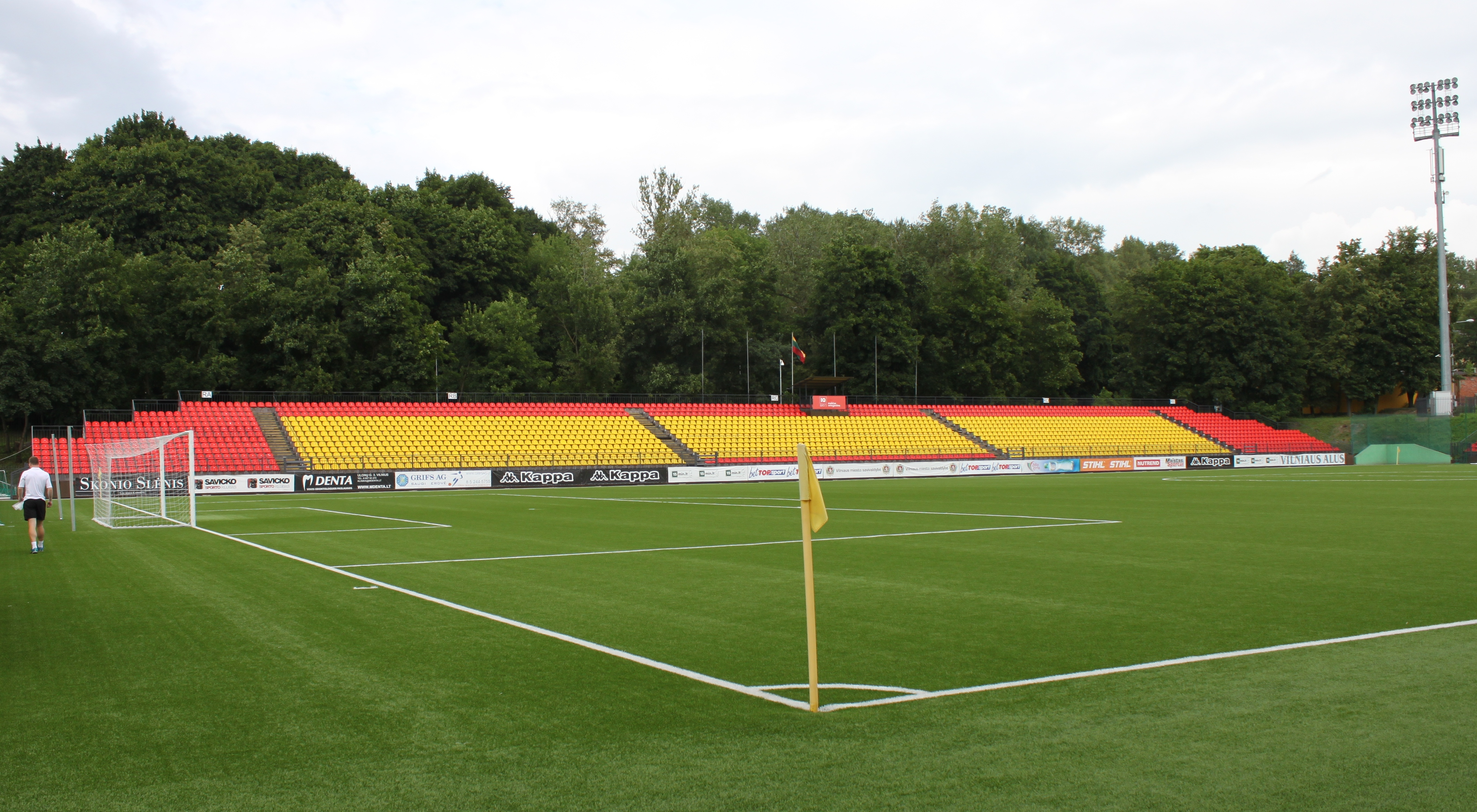 LFF stadiono Rytų tribūna